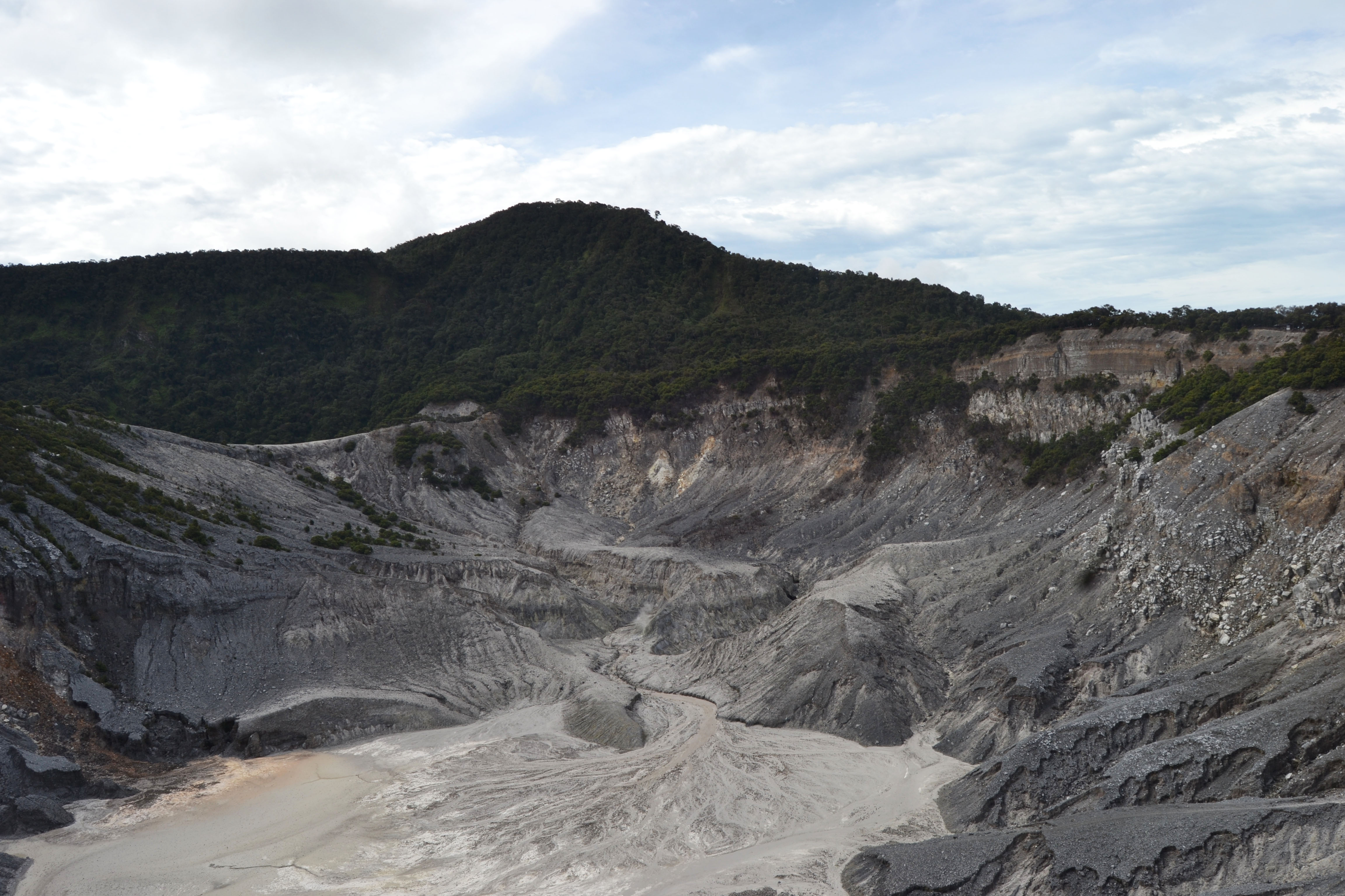 berdiri tangguh, tidak hanya membuat keindahan dalam dekorasi alamiah karunia Illahi untuk Indonesia dan bangsanya. namun turut ikut serta menggambarkan kehidupan bangsa hingga kebudayaan yang terkandung moral di dalam cerita rakyat yang judulny diangkat persis dari nama gunung ini yakni, Tangkuban Perahu.